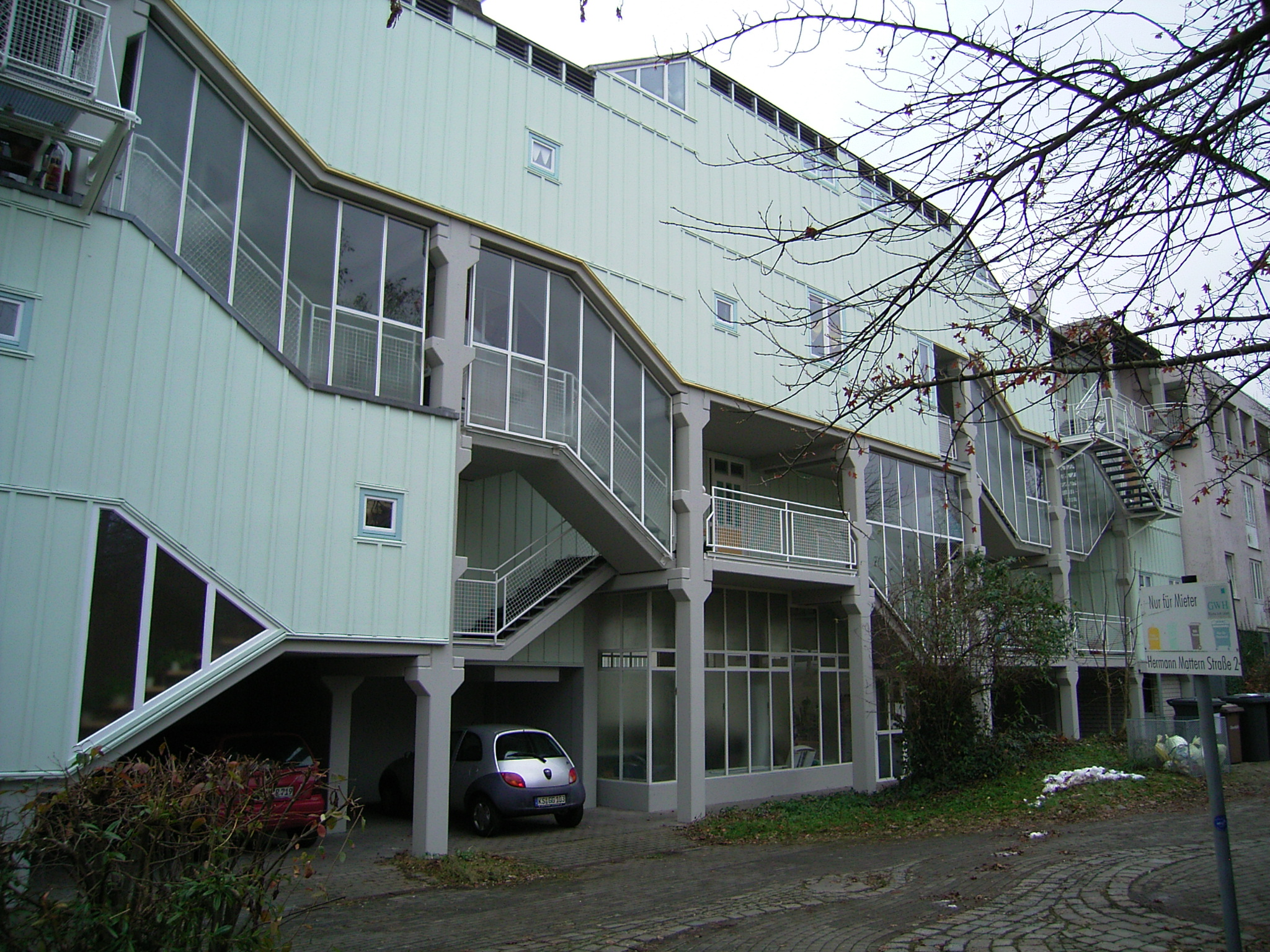 documenta urbana Wohngebäude in Kassel 1979-1982. Teil der „Wohnschlange“. Otto Steidle und Partner